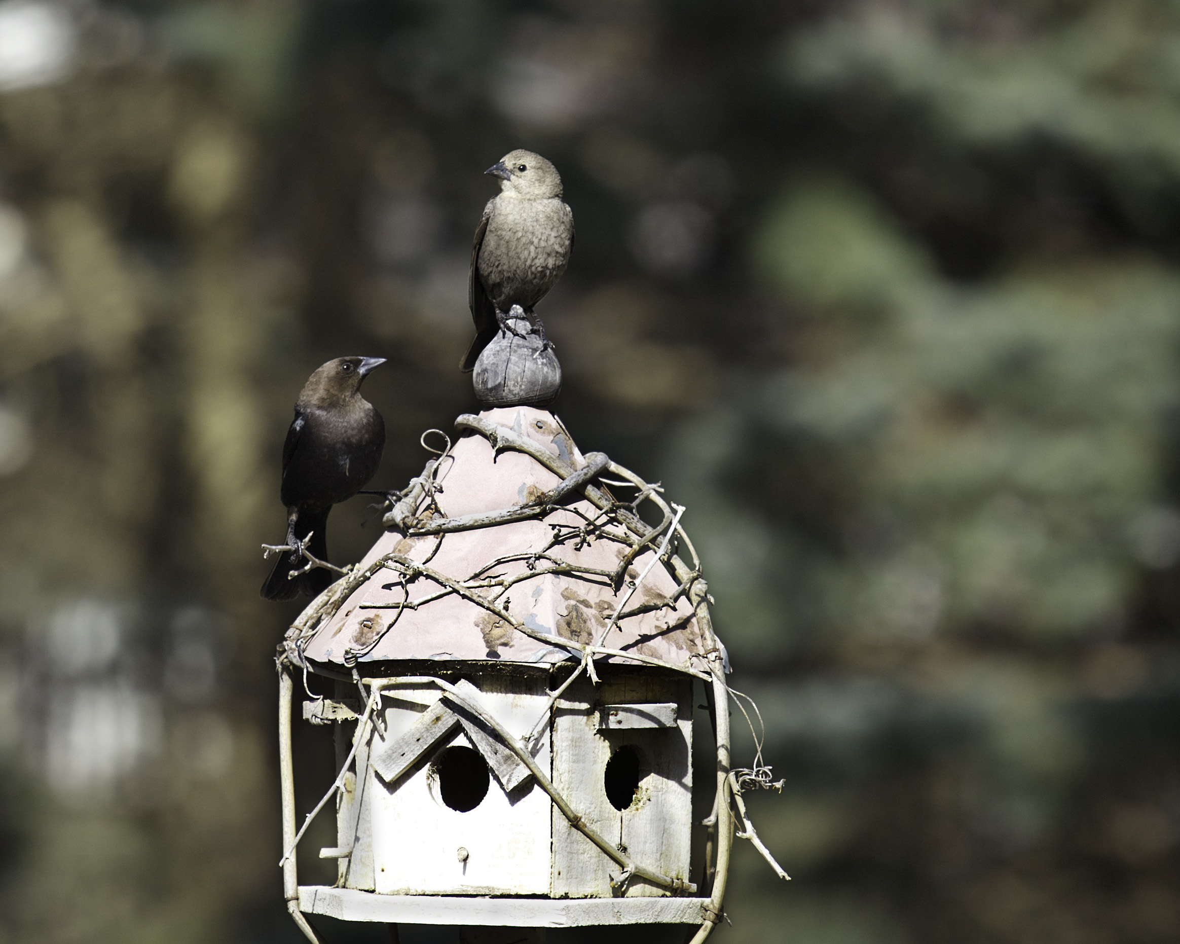 a pair